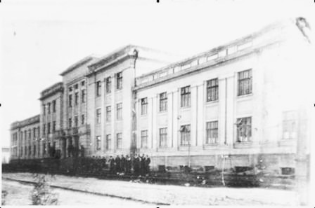 Криворізький педагогічний інститут, корпус 1936 року